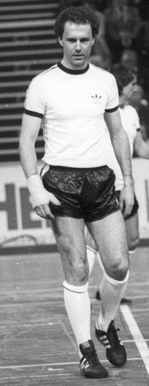 Fußballspiel zwischen einer Prominentenauswahl ehemaliger Weltklassefußballer (weiße Shirts) gegen eine Auswahl von Holstein Kiel (dunkle Shirts). In der Bildmitte der Fußballspieler Franz Beckenbauer (2.v.l.).